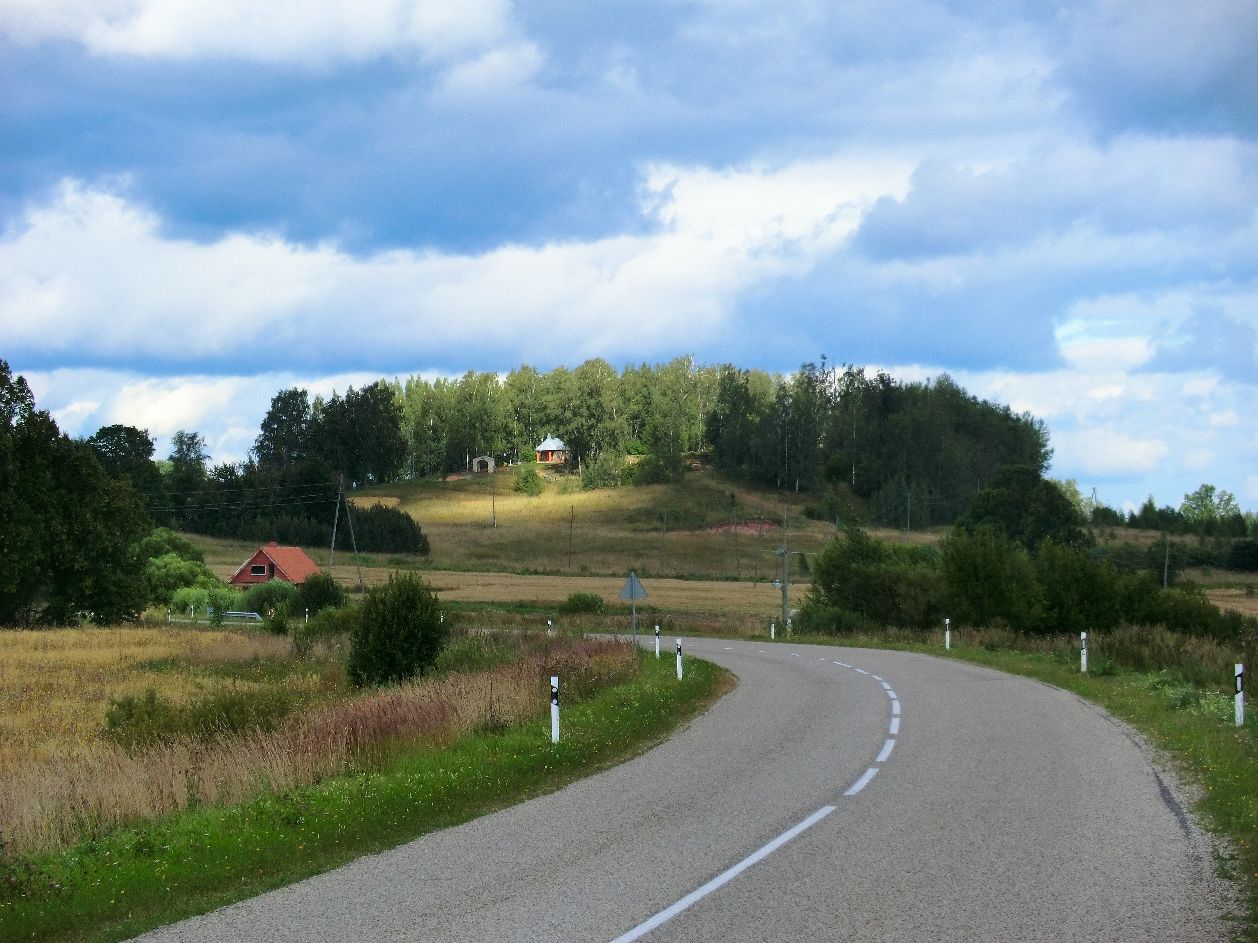 Brieksīnes kalns